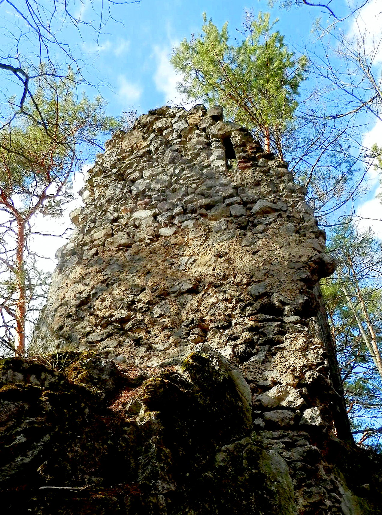 Hradné bralo so zvyškami ruín, sa nachádza v lese, západne od obce Lipovce. Miestny názov Zámčisko (618m.n.m), Jazvečia hora alebo aj Varhoška. Prvá písomná zmienka o hrade pochádza z roku 1262.